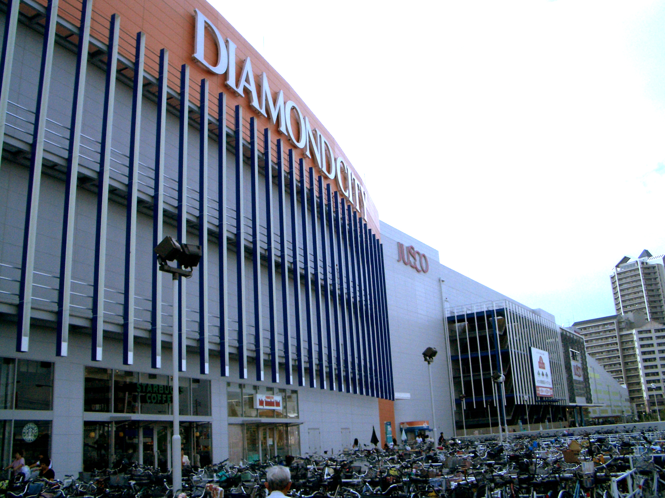 DIAMOND CITY prou,Higashiasakayamacho Kita-Ku Sakai-City Osaka Japan.